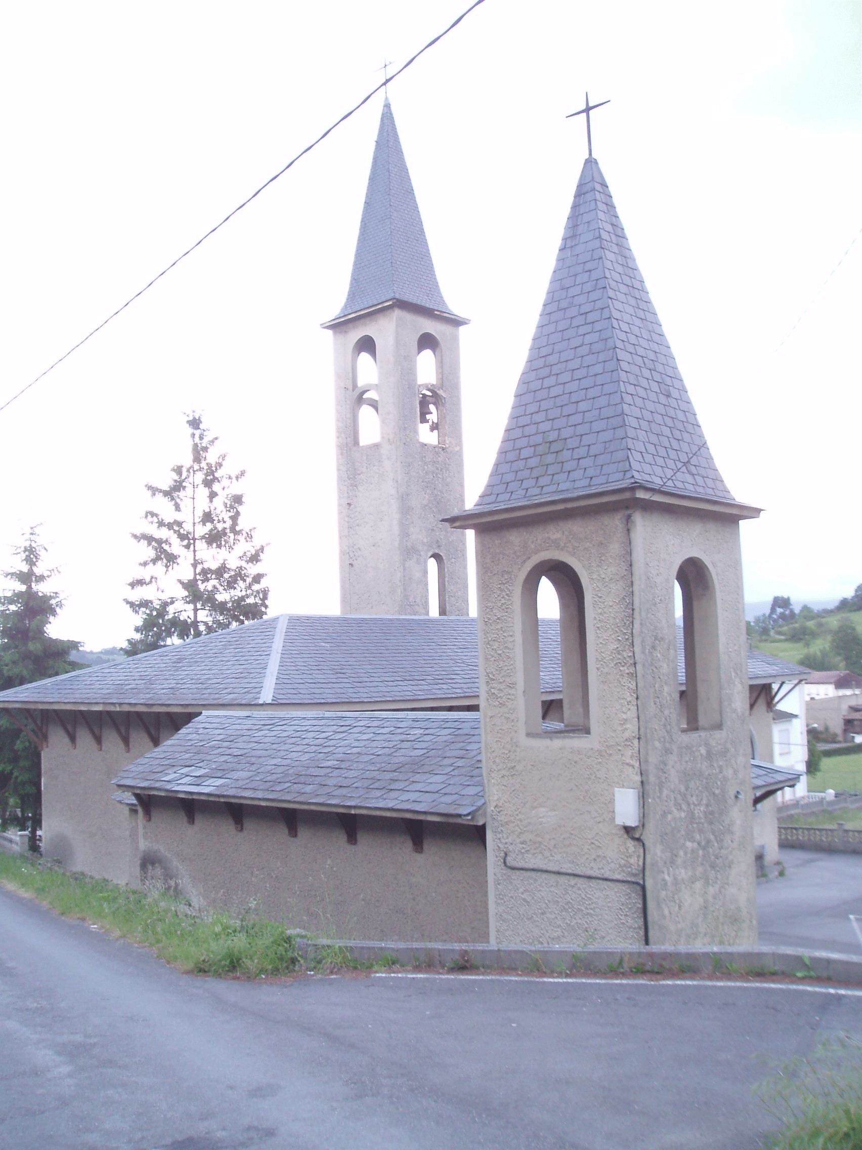 Iglesia parroquial de San Cristóbal de Collado, en el municipio de Siero (Asturias, España)